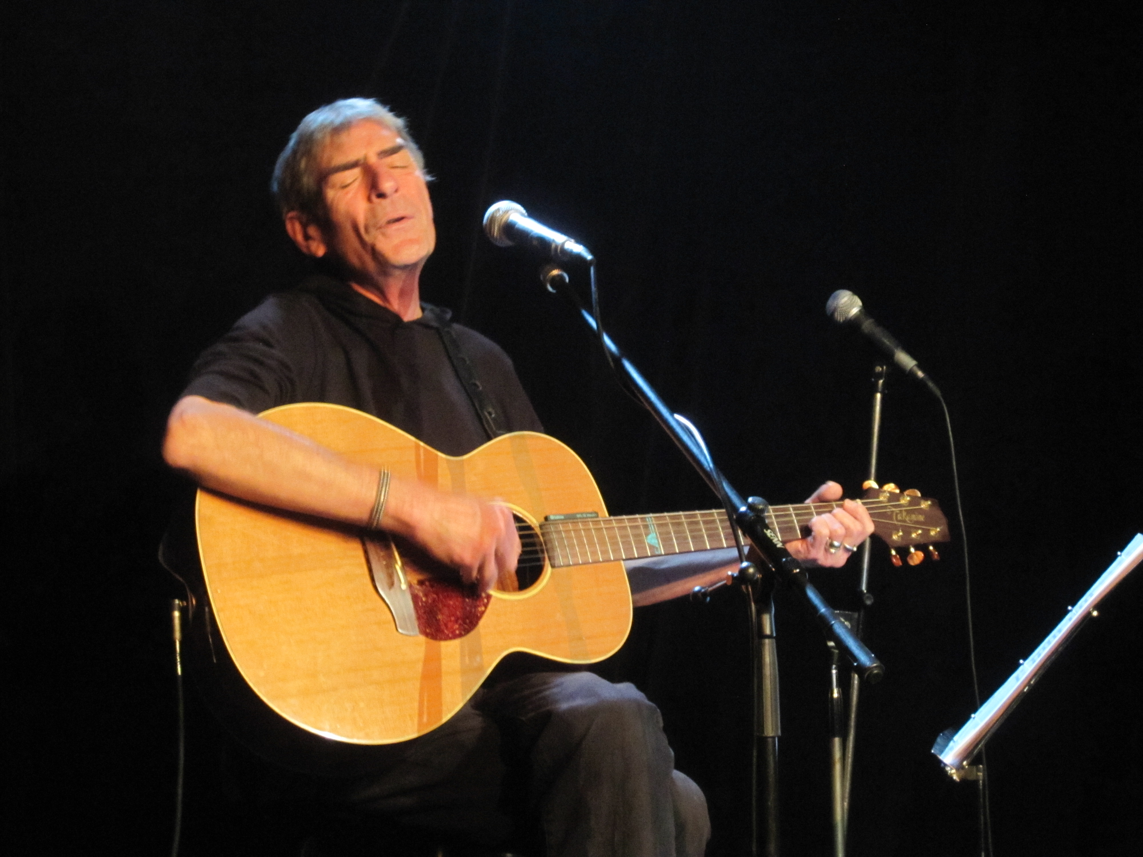 Gabriel Yacoub sur scène à Lyon le 11-11-11